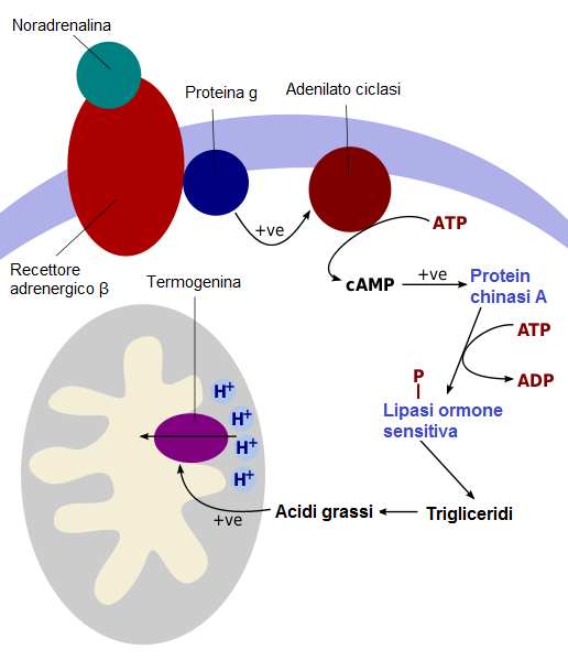 descrizione del funzionamento della proteina termogenina